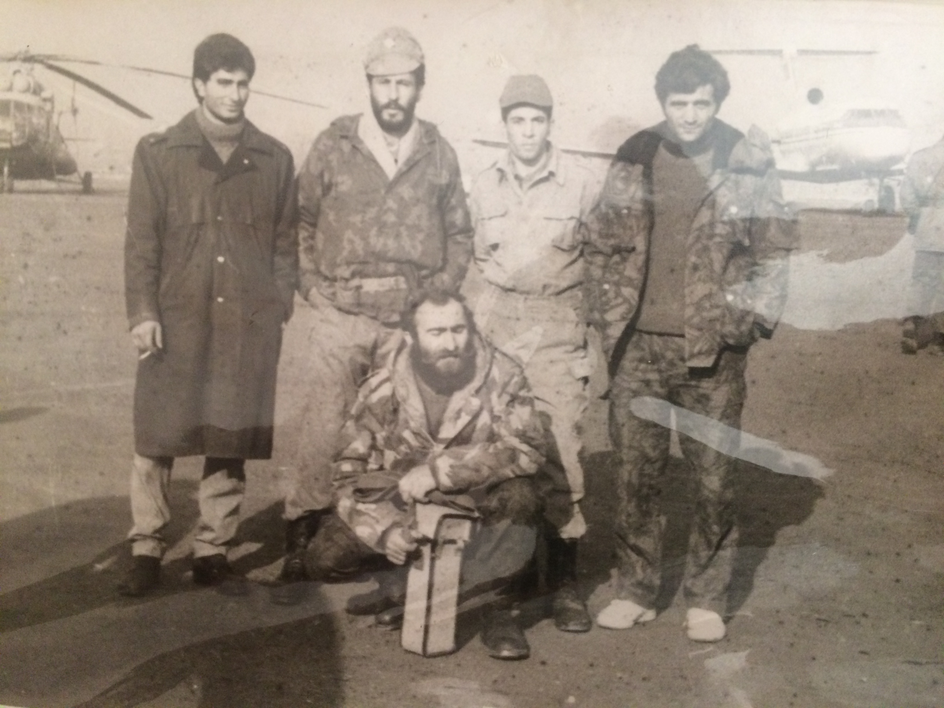 Աջից ՝ Վաչե Ռոստոմյան, ձախից ՝ Սամվել Խոստեղյան, ներքևում ՝ Պավլիկ Մանուկյան